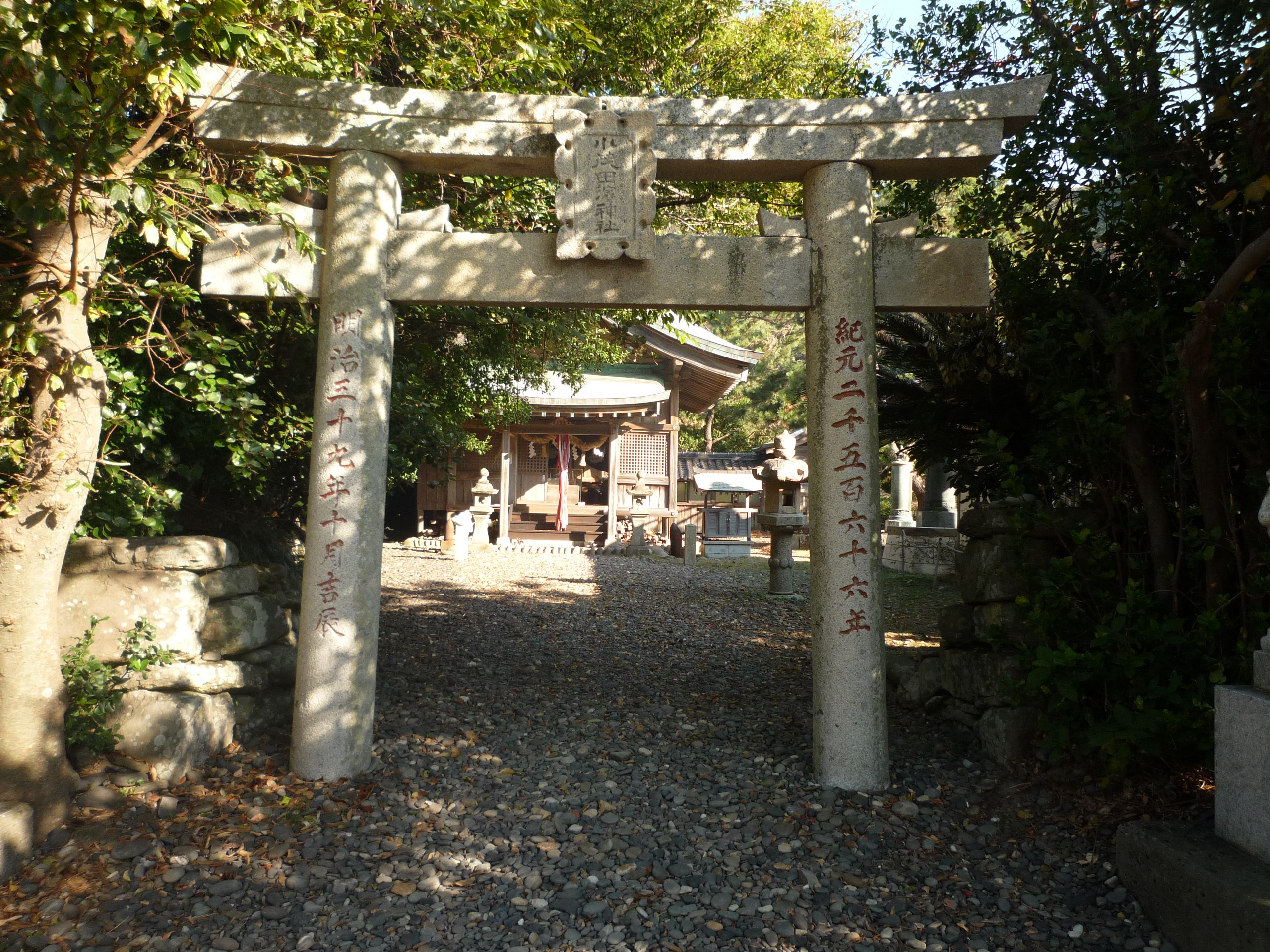 小茂田神社の鳥居